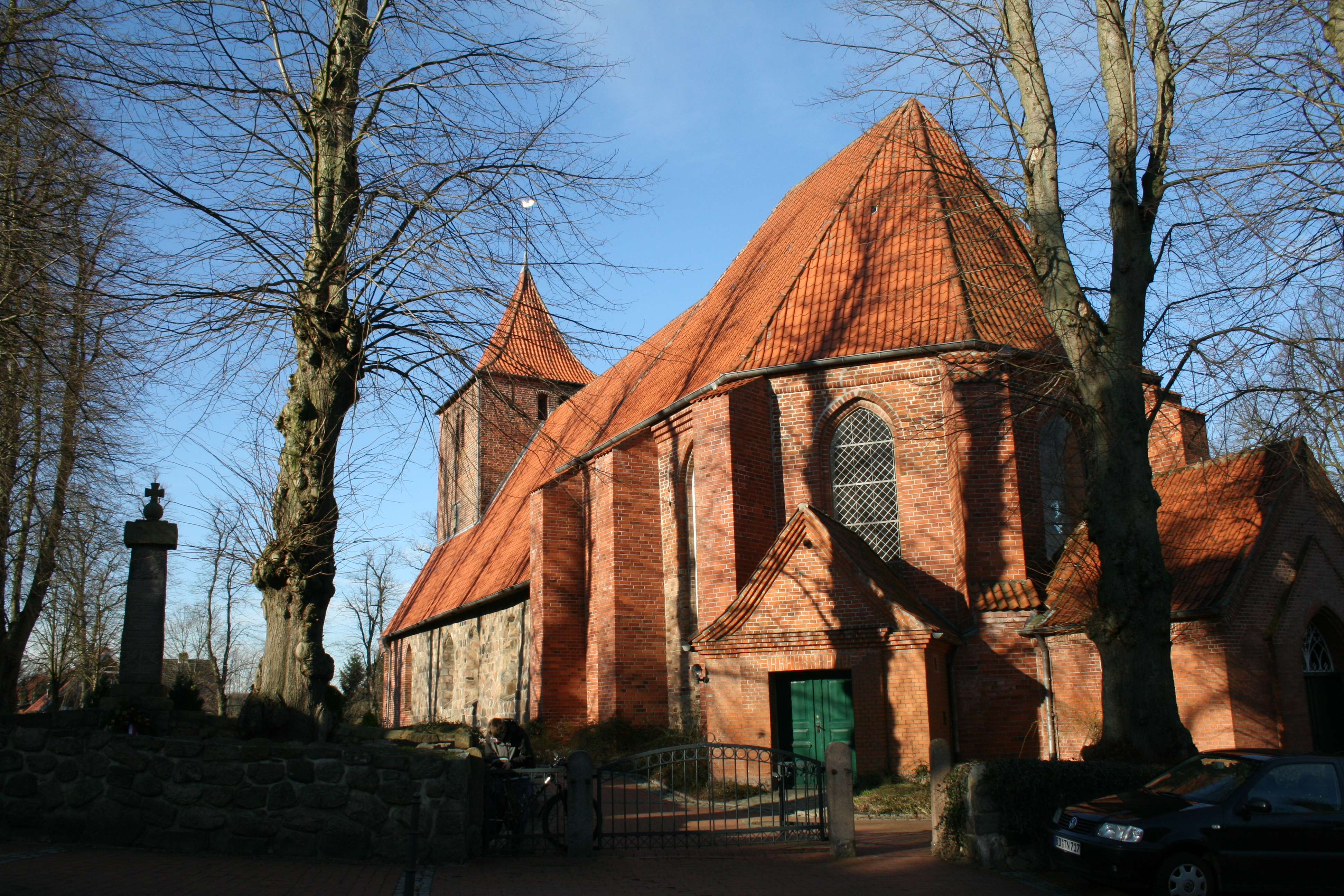 St. Catharina-church in Westensee, Schleswig-Holstein, Germany